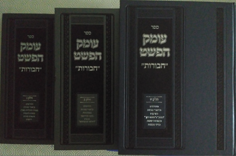 תמונה של סדרת ספרי עומק הפשט